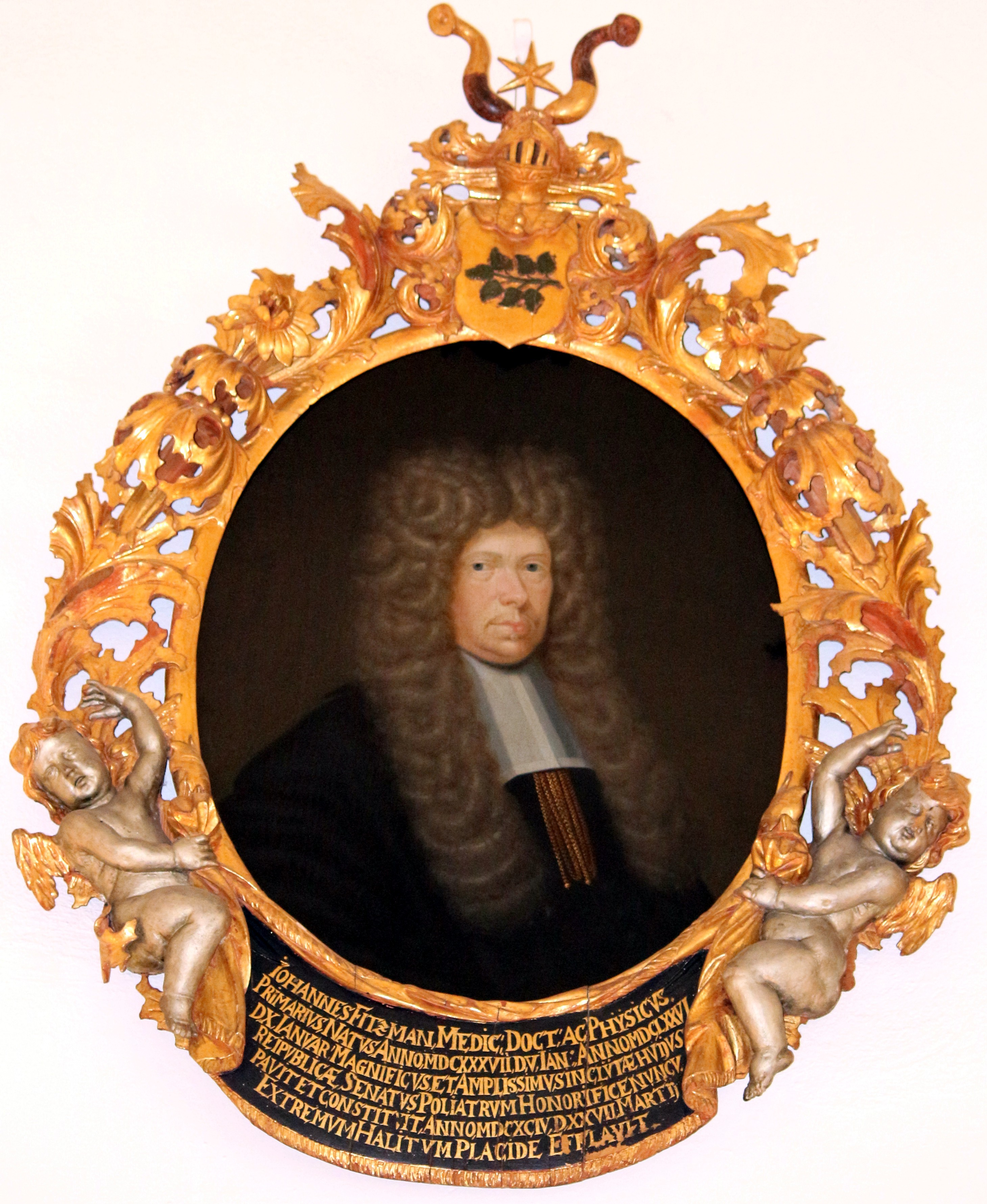 Der Arzt Johannes Fitzmann (5. Januar.1637 - 27. März. 1694) - Gemälde im Scharbausaal der Stadtbibliothek Lübeck